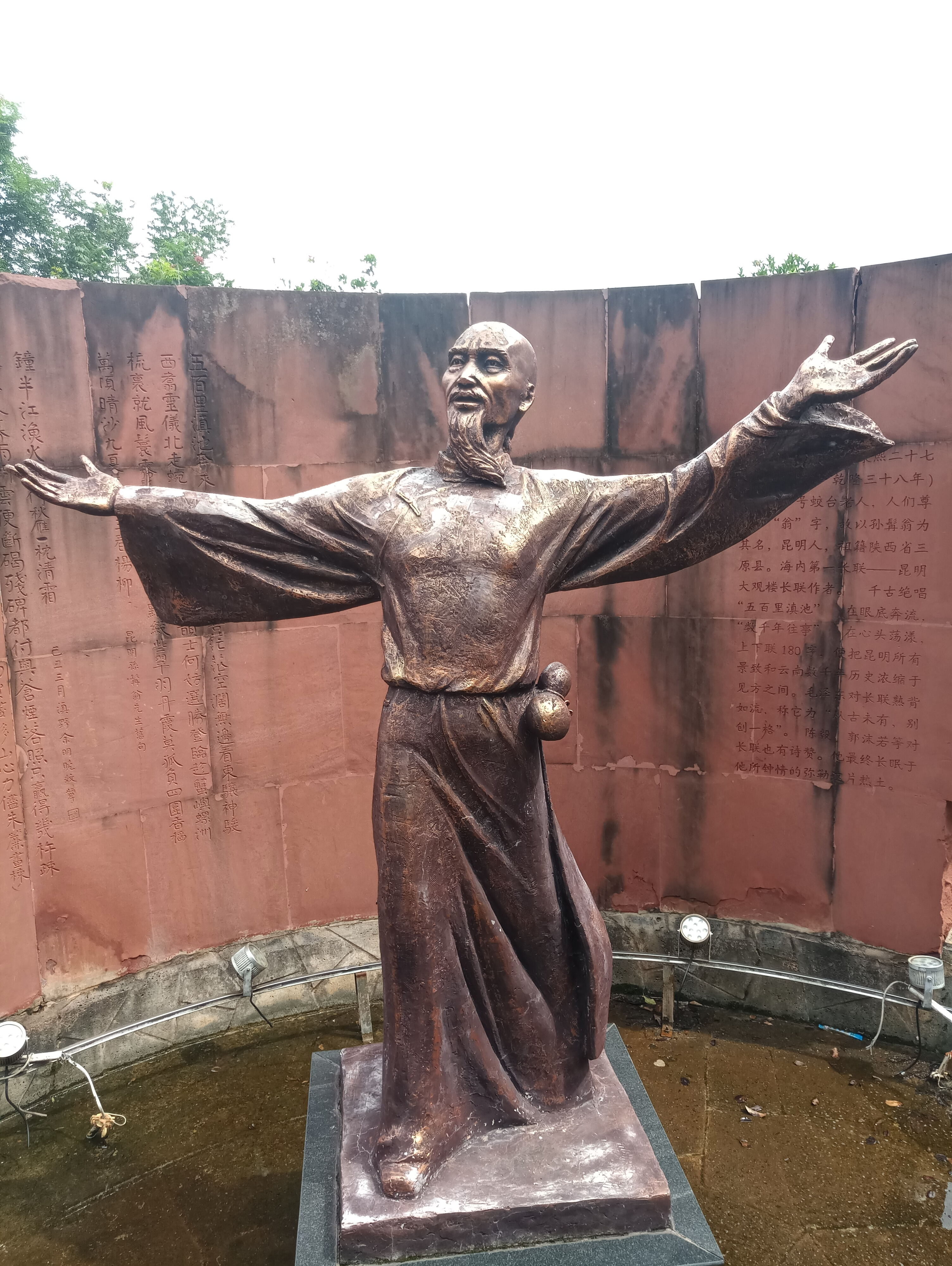 中文（中国大陆）: 弥勒湖泉名人文化园-孙髯翁像